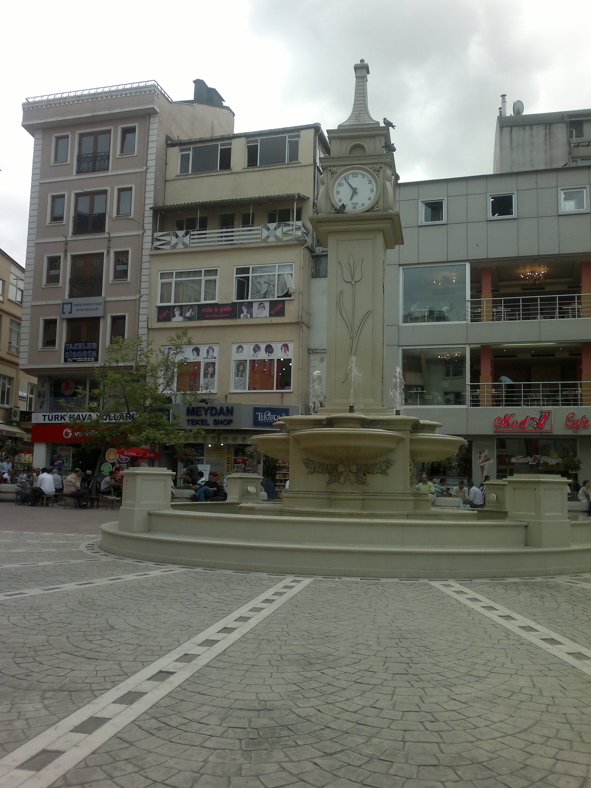 Fatsa Meydanı